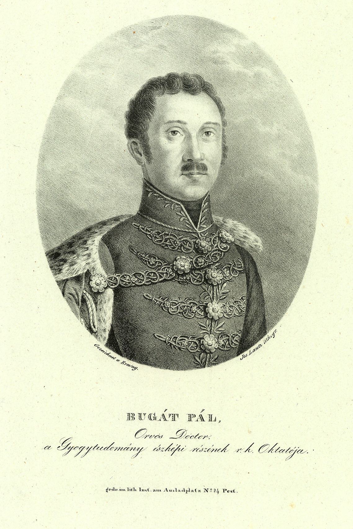 Bugát Pál (Gyöngyös, 1793. április 12. – Pest, 1865. július 9.) orvos, egyetemi tanár, az MTA tagja, nyelvújító. Szobra a róla elnevezett egészségügyi szakközépiskolában, a Székesfehérvári Belvárosi I. István Középiskola Bugát Pál Tagintézményének aulájában megtekinthető. (